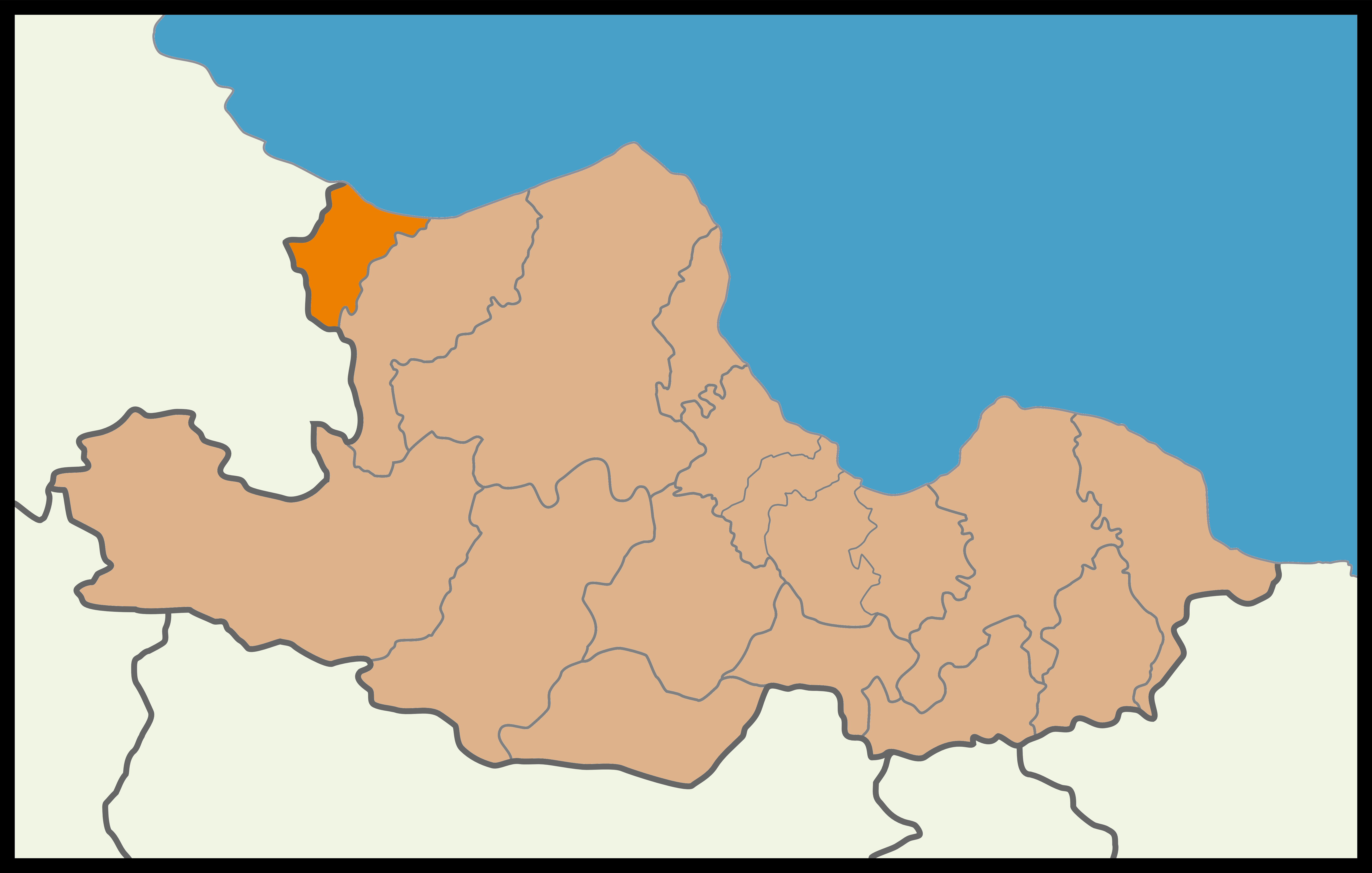 Samsun'un Yakakent ilçesinin 2015 Türkiye genel seçimleri haritası.